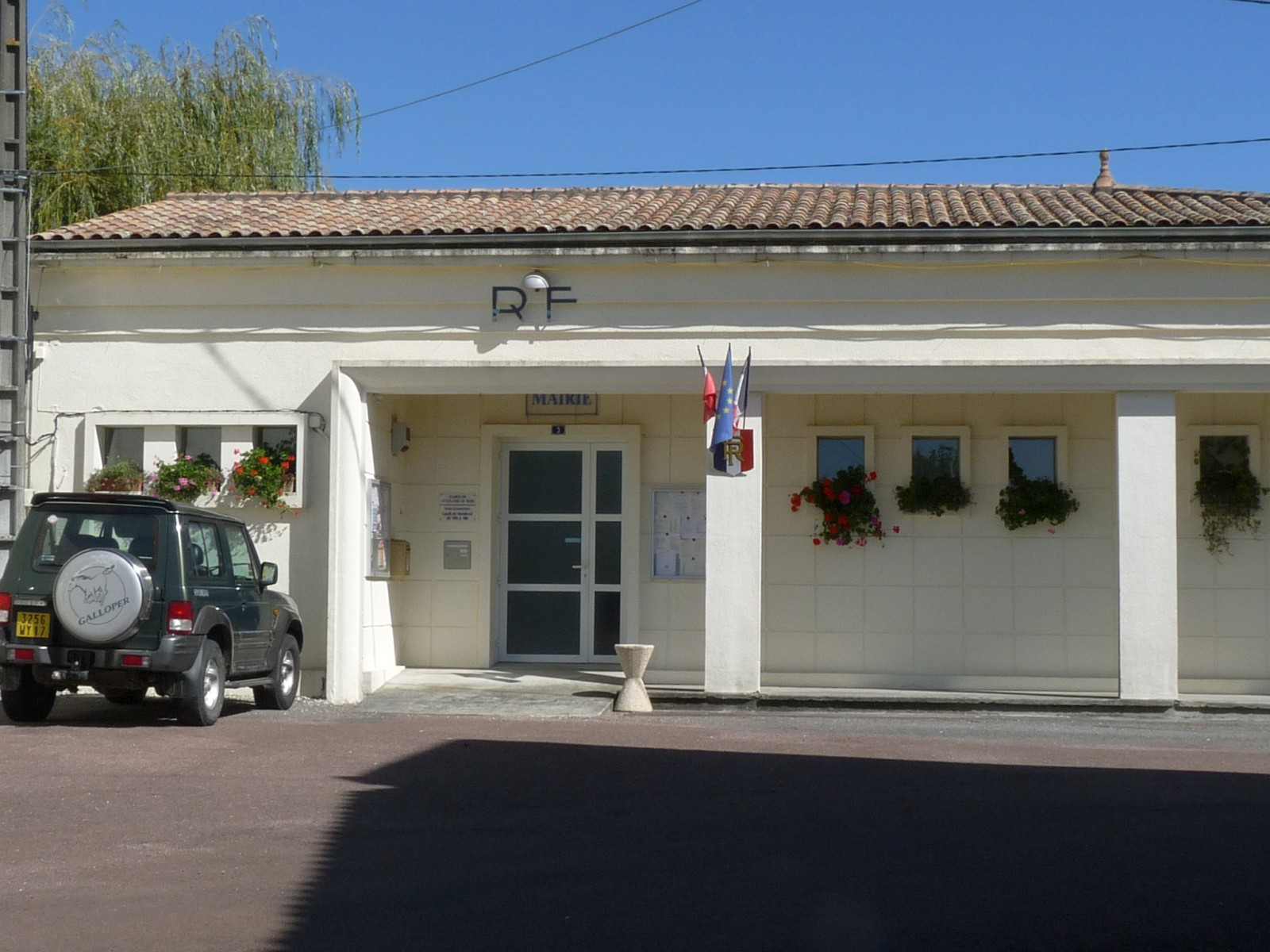 Mairie de St-Hilaire-du-Bois, Charente-Maritime, France